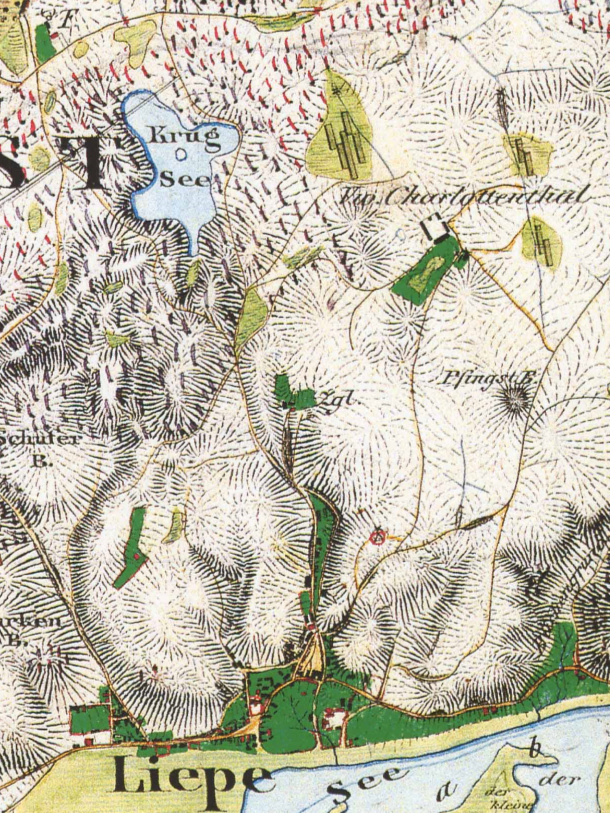 Liepe mit dem ehemaligen Vorwerk Charlottenthal der Gemeinde Liepe und dem inoffiziellen Wohnplatz Forsthaus Liepe der Gemeinde Chorin, Lkr. Barnim, Brandenburg, Ausschnitt aus dem Urmesstischblatt 3149 Falkenberg von 1844